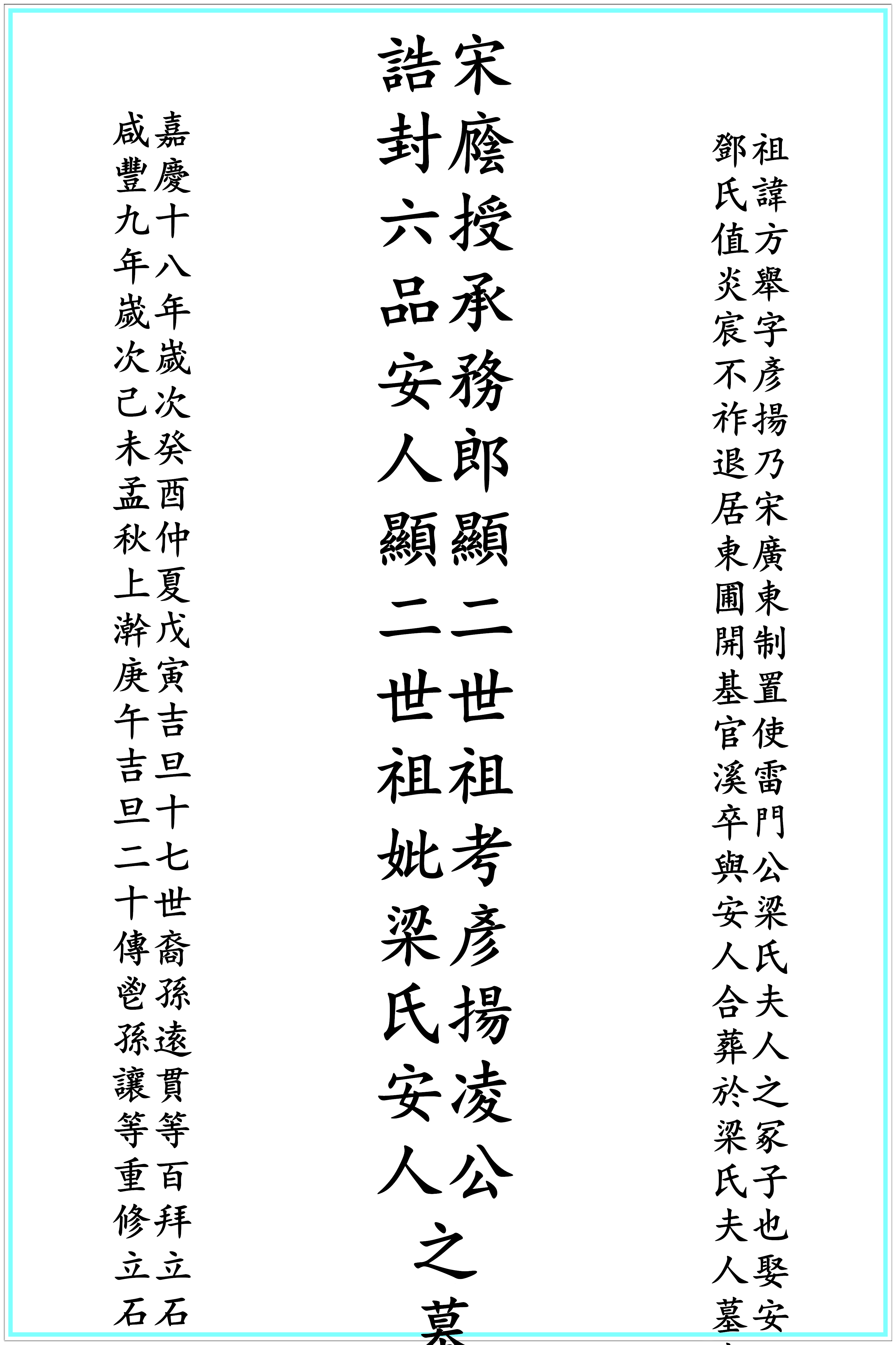 中文（中国大陆）: 凌彦扬夫妇合葬墓墓碑图版。